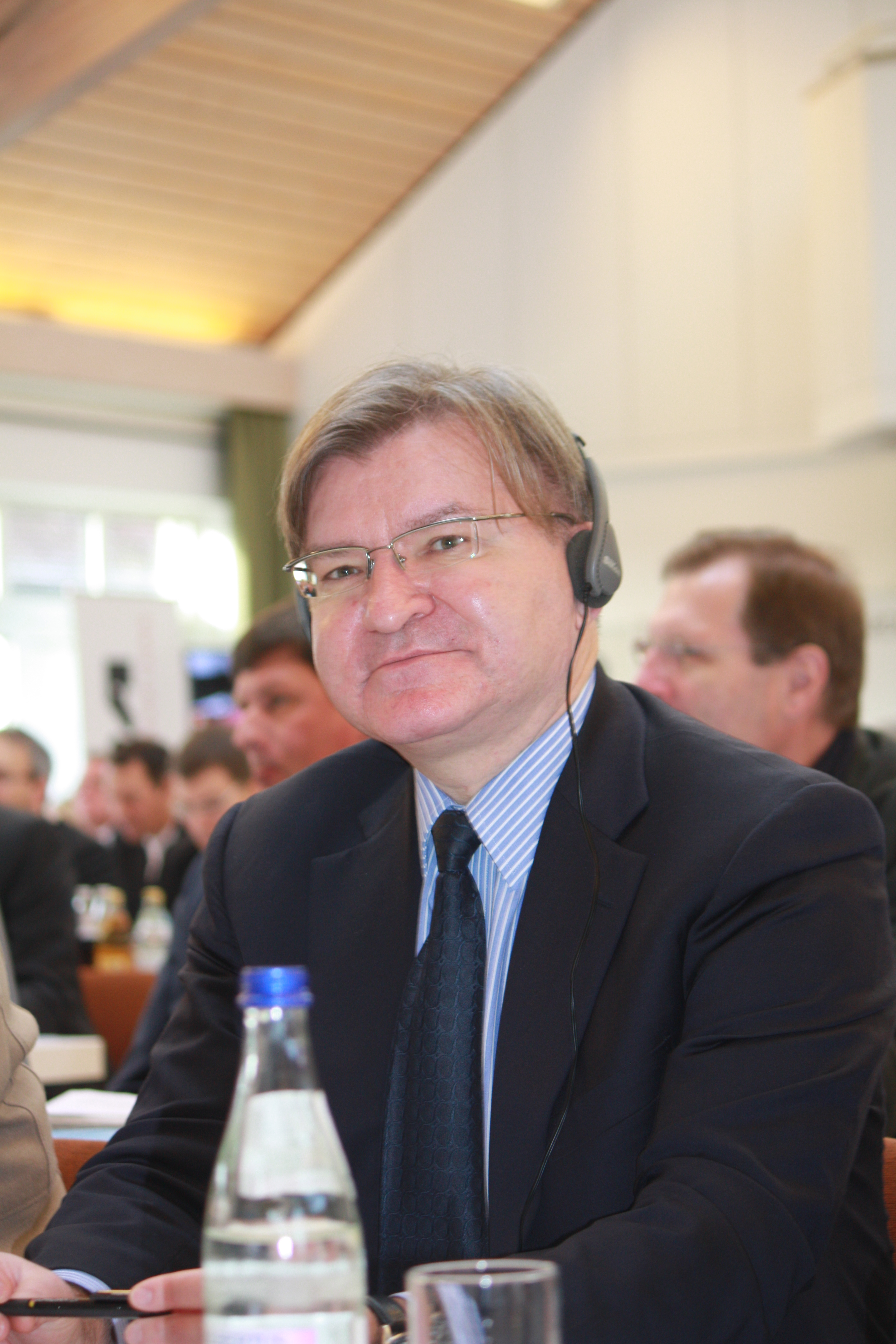 Grigory Nemyria